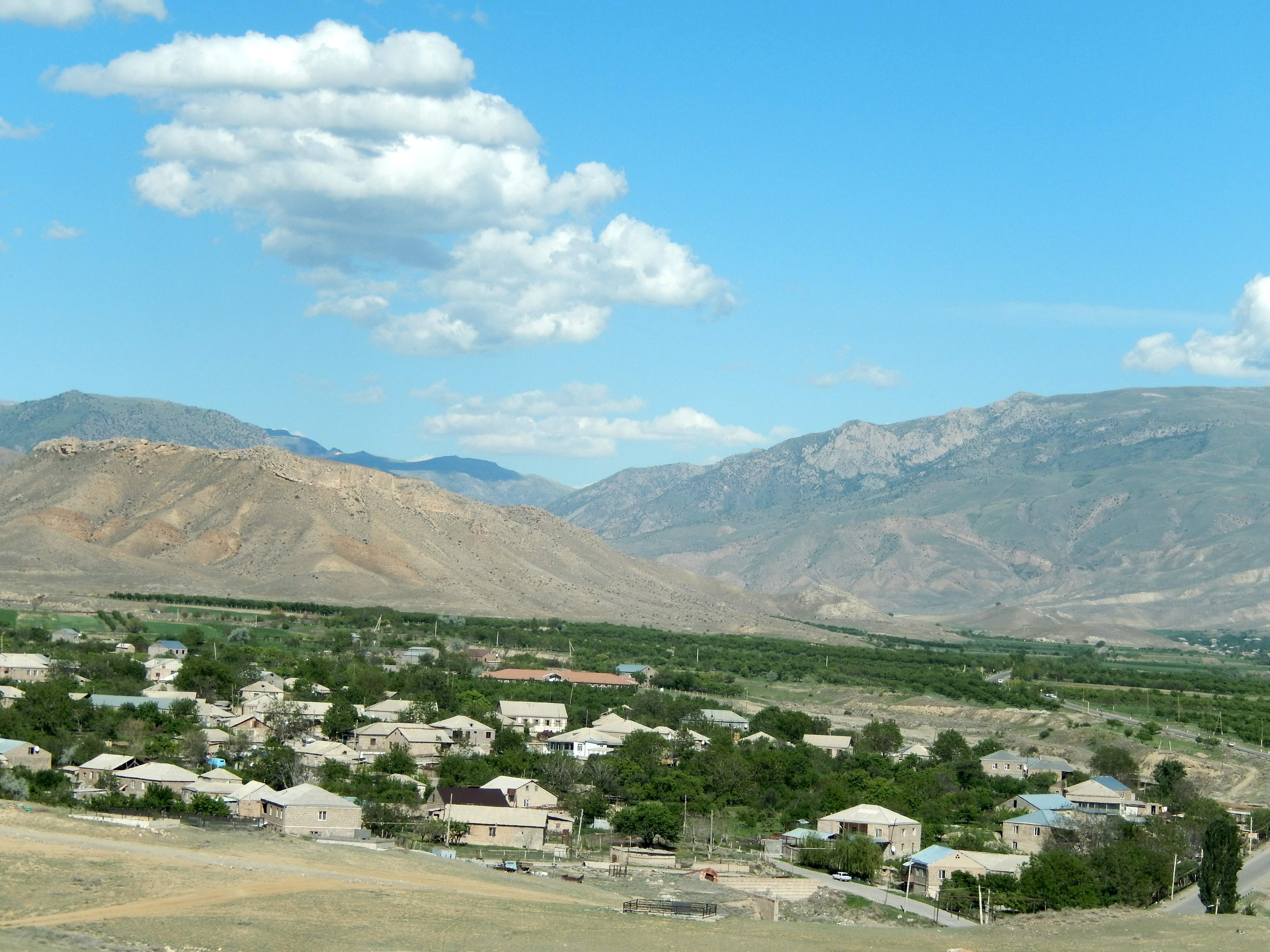 Դաշտաքար քարանձավ